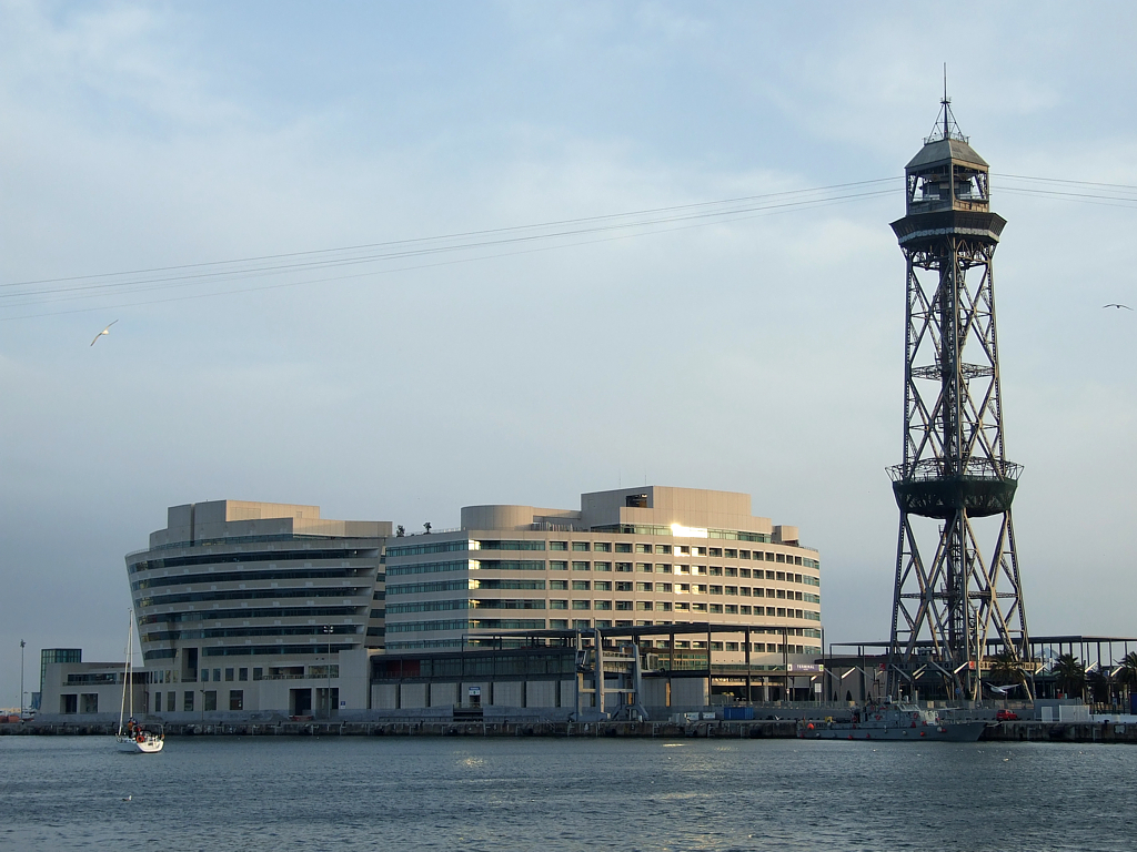 Vista del World Trade Center y la torre del teleférico a Montjuic, situados en el muelle 18 del puerto de Barcelona.